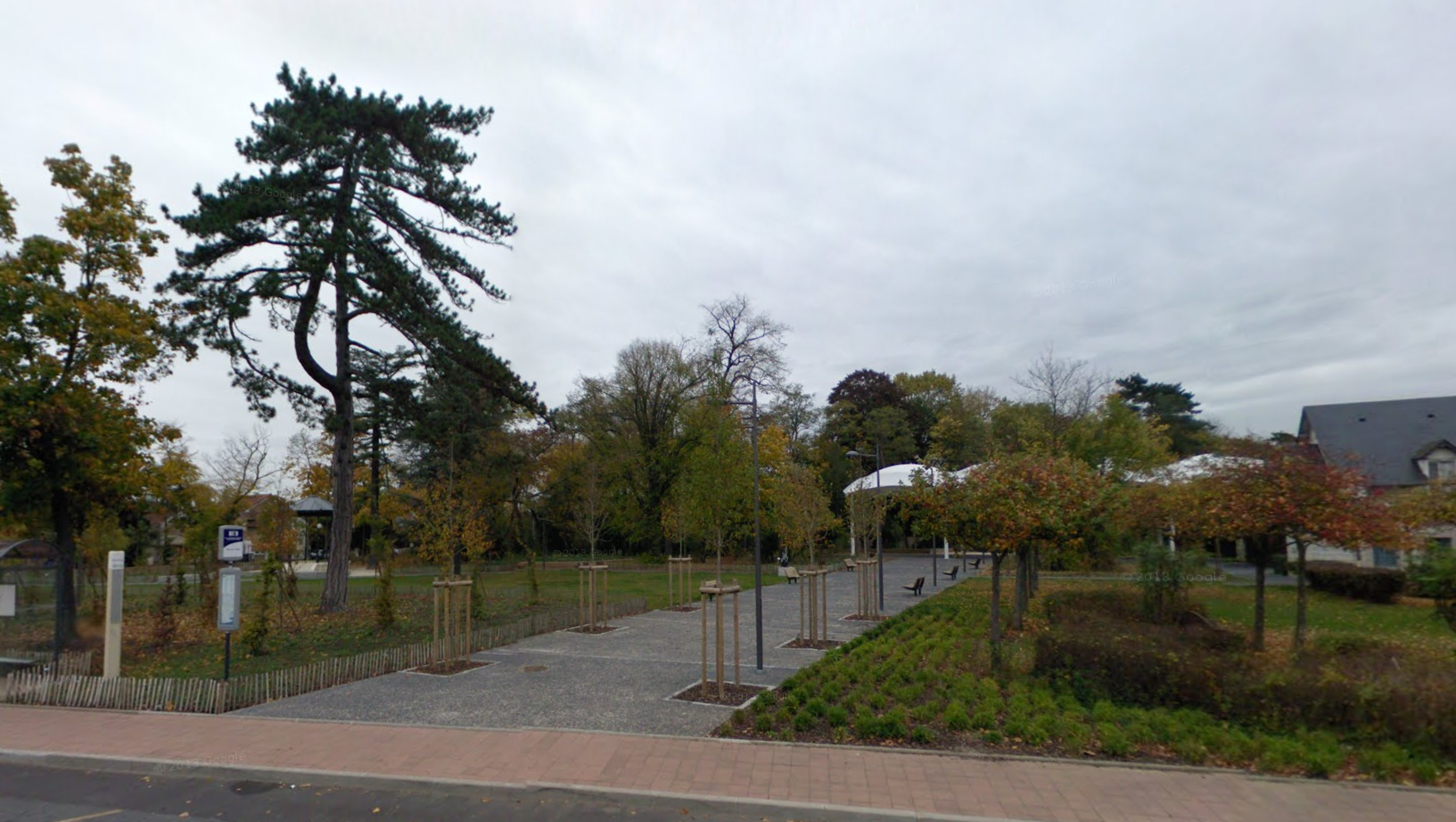 Parc de la mairie de Quincy sous Sénart, Essonne, 91, Ile de France